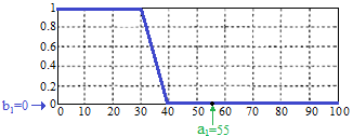 рис1